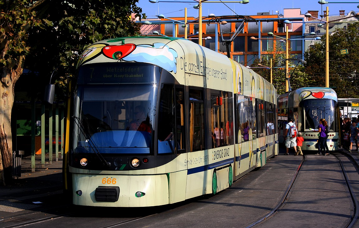 Espletava la linea "7" a Graz